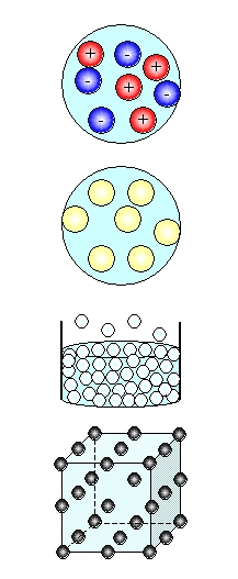 A négy halmazállapot szemléltetése